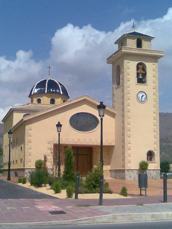 Ermita del Sagrado Corazón